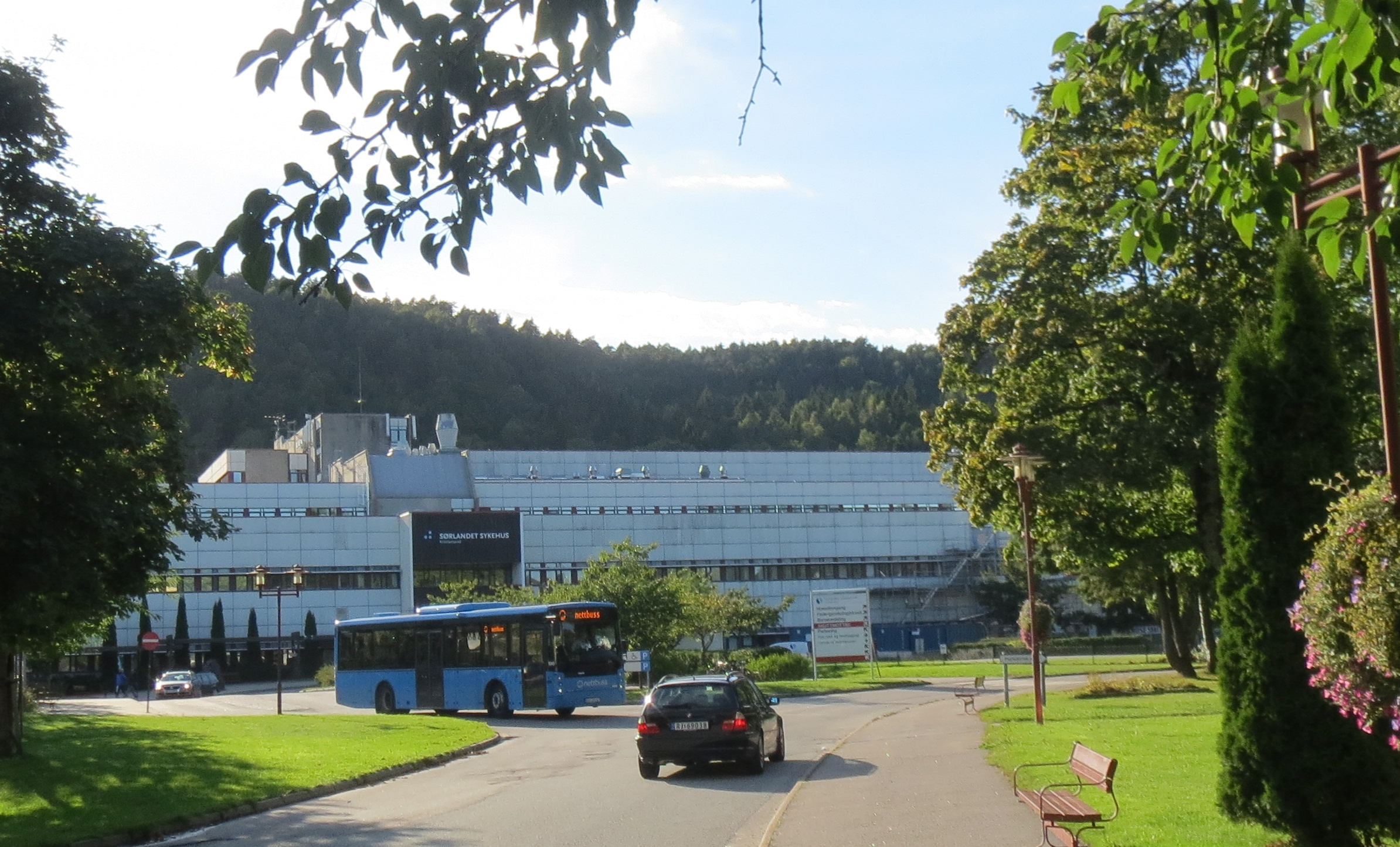 Hovedinngangen Sørlandet Sykehus Kristiansand